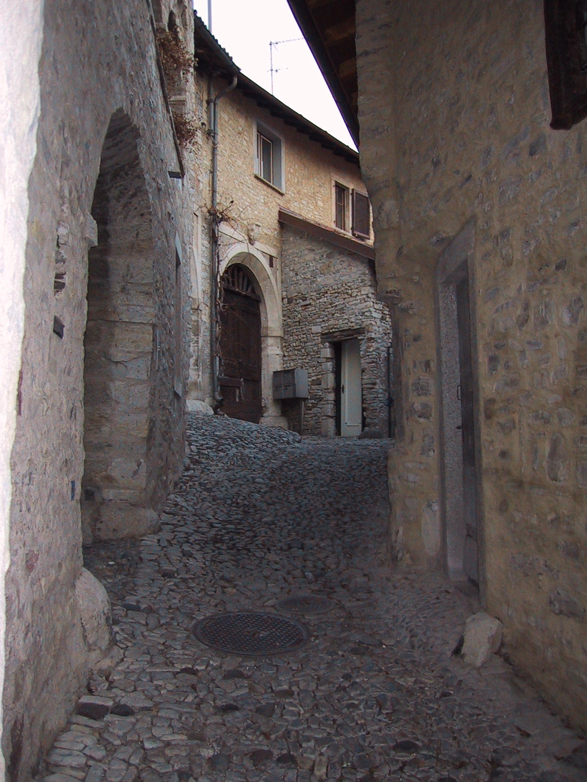 Gasse in Meride, Schweiz